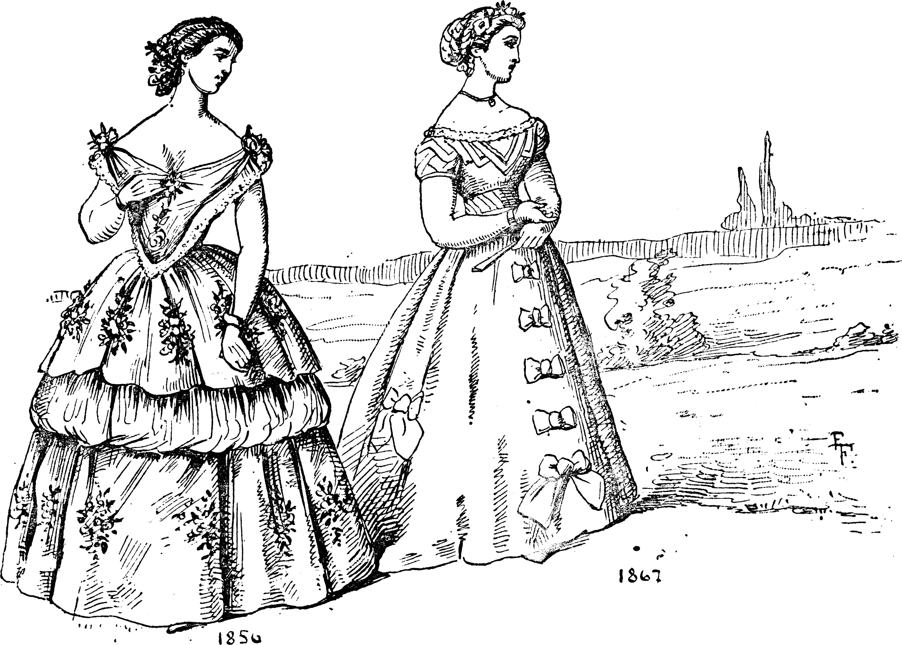 Illustration for Le Mannequin